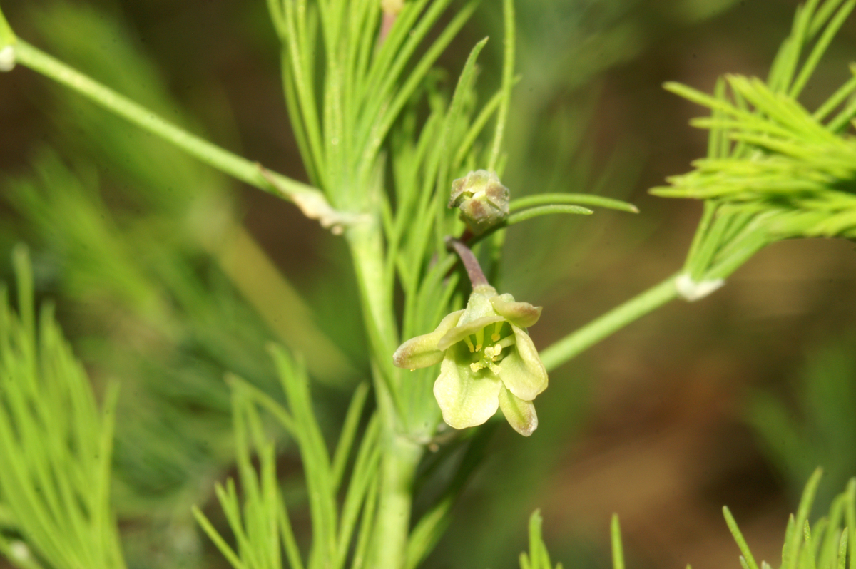 Lasasti beluš na Slavniku.